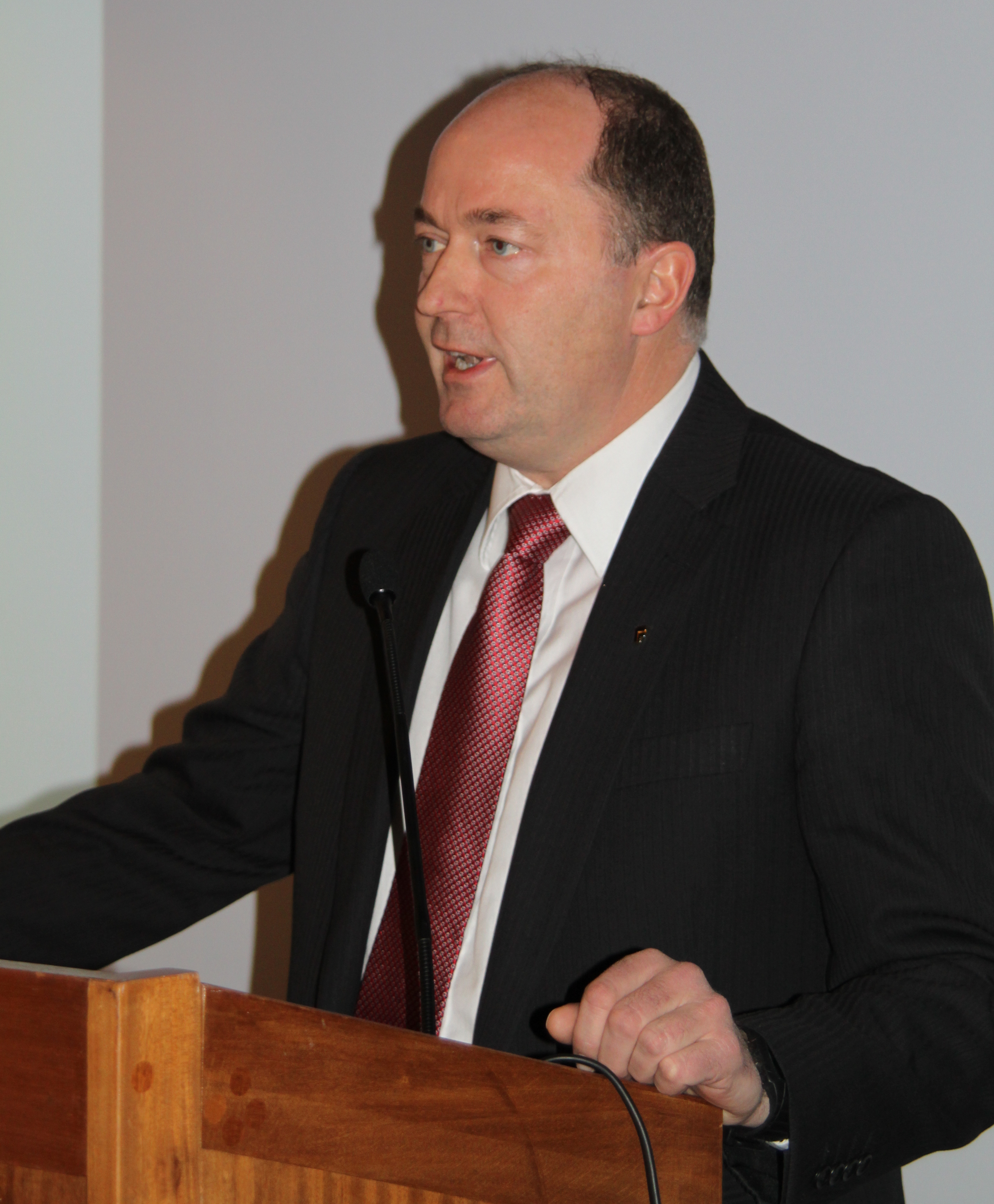 Morten Stordalen holder valgtale på nominasjonsmøte 2012